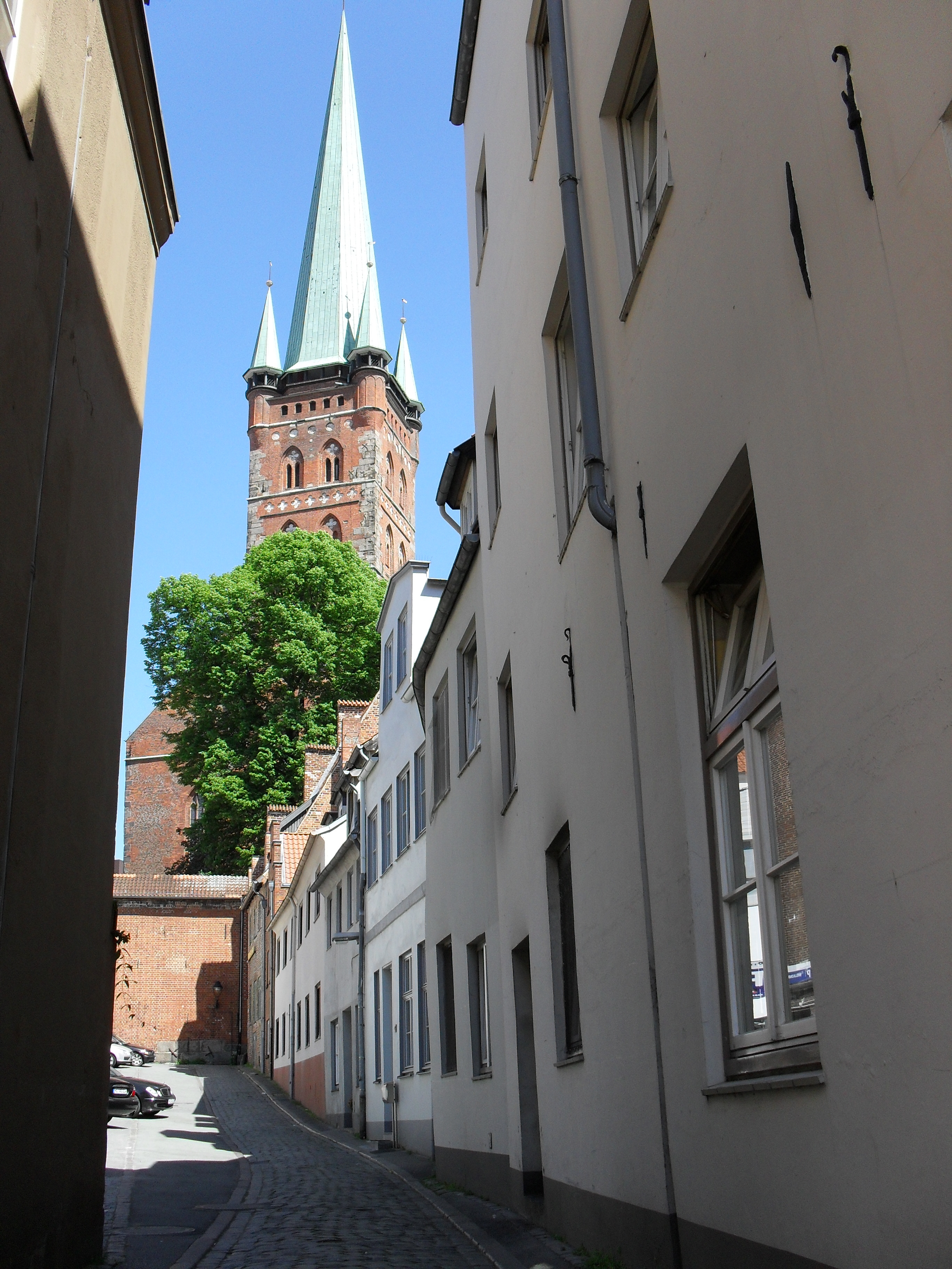 Die Pagönnienstraße in Lübeck